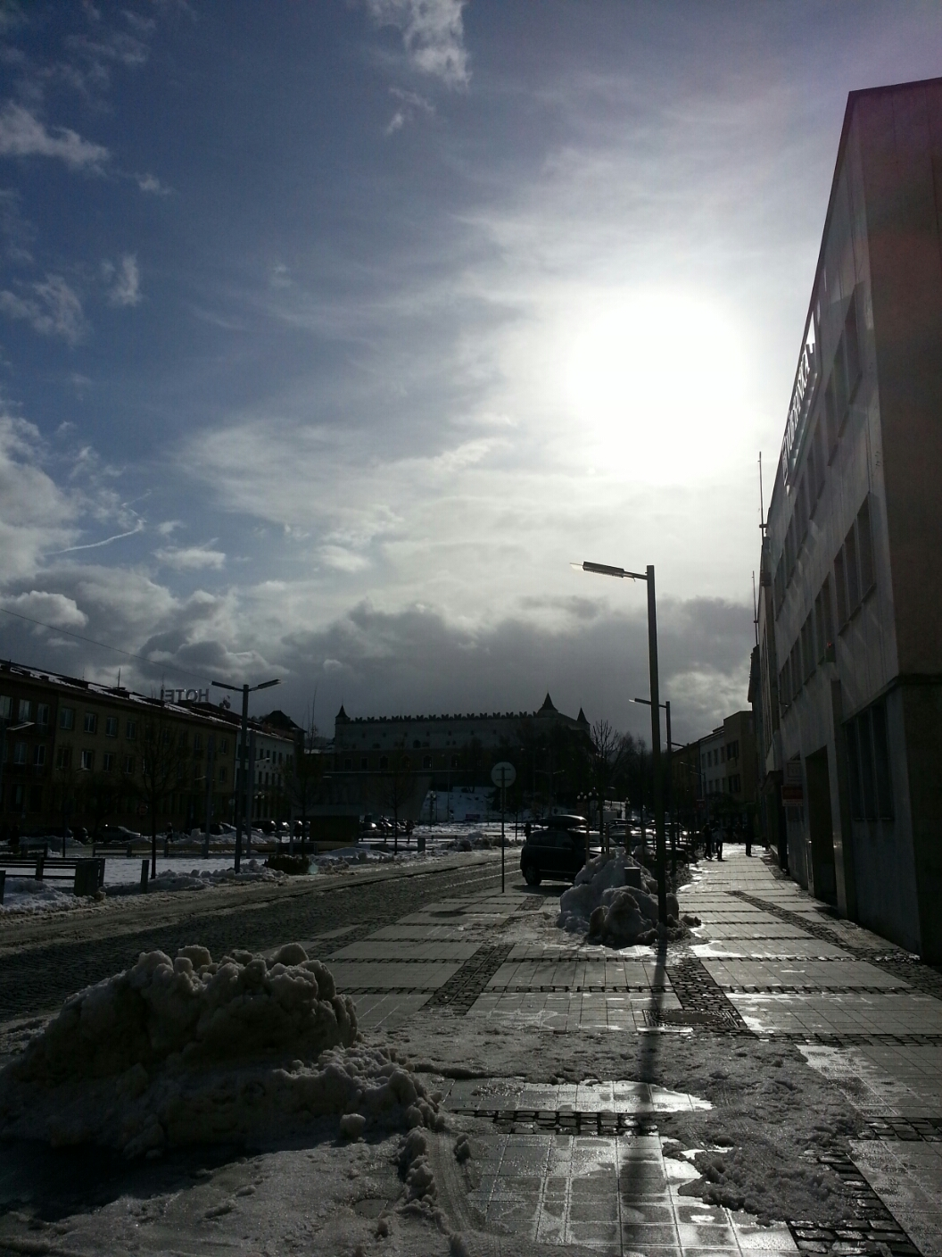 Zvolen - Námestie SNP a Zvolenský zámok cez zimné obdobie